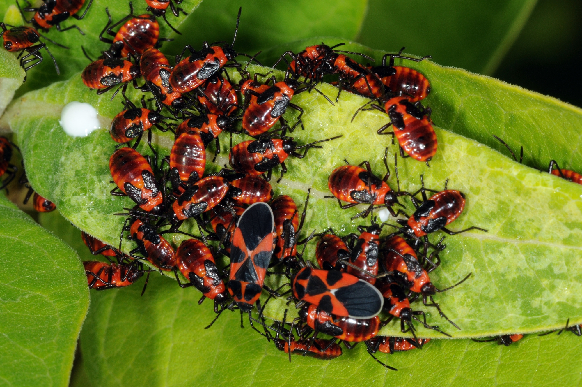 Tropidothorax leucopterus, Mainzer Sand, Rheinland-Pfalz, Deutschland